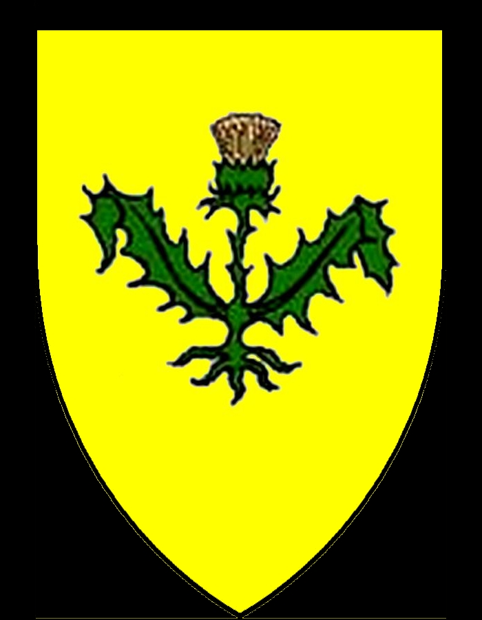 Blason armoiries de la famille antoniazzi